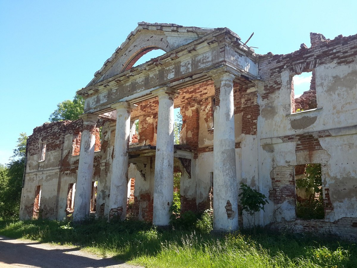 Обаль. Сядзіба